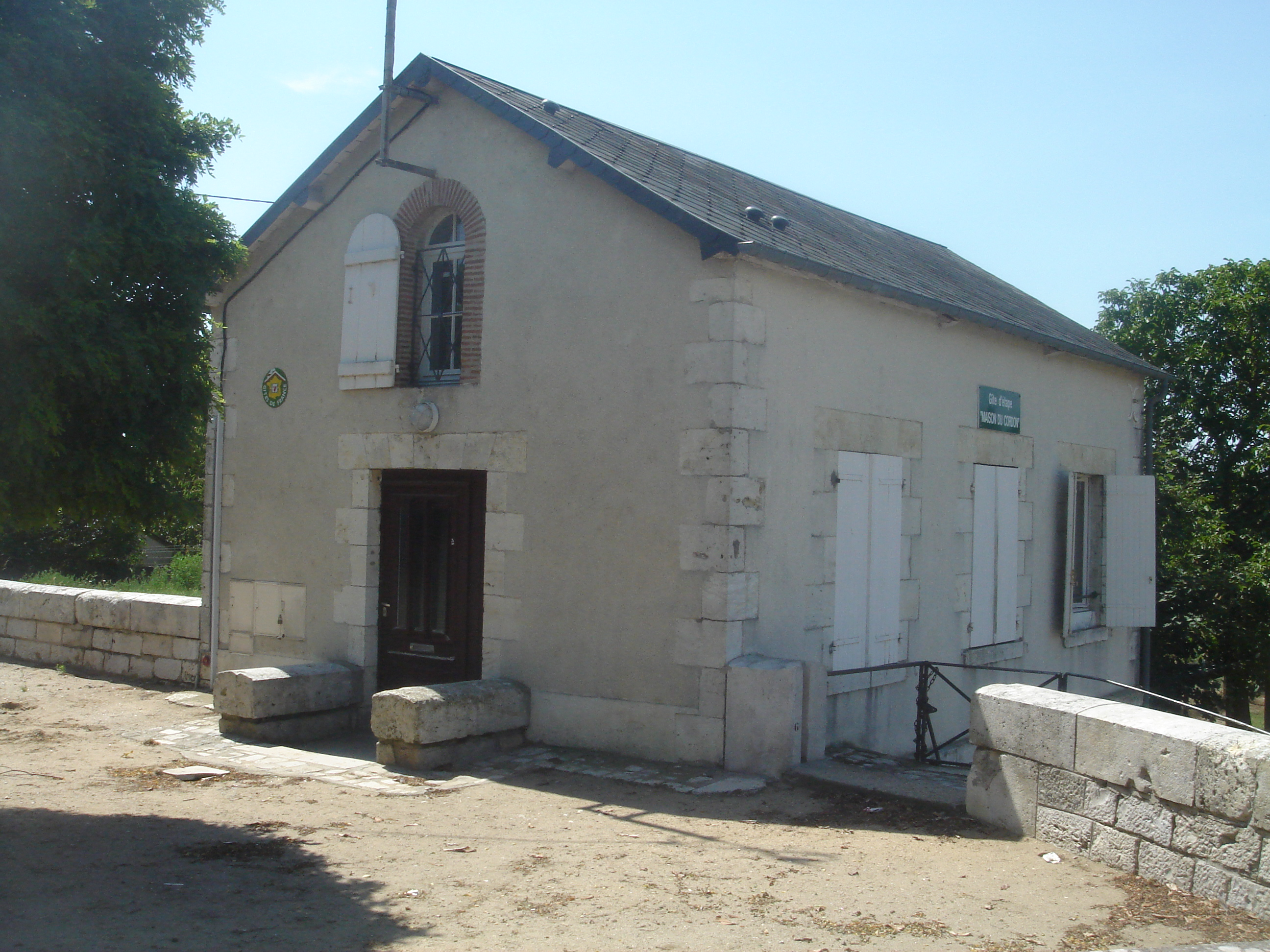 Gîte d'étape, Maison du Cordon, Jargeau, Loiret, France